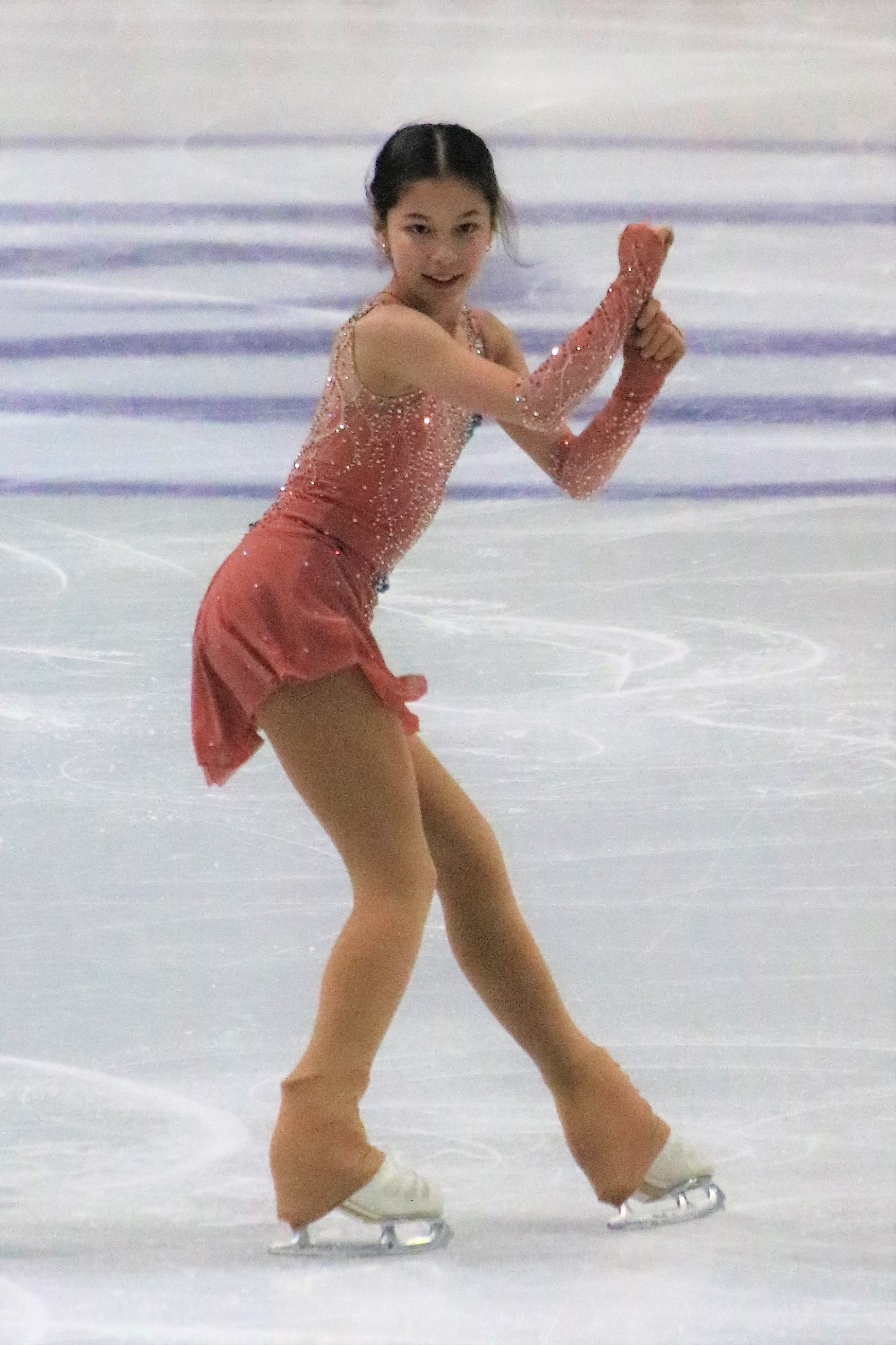 Алиса Лю (США) на финале юниорского Гран-при 2019-2020